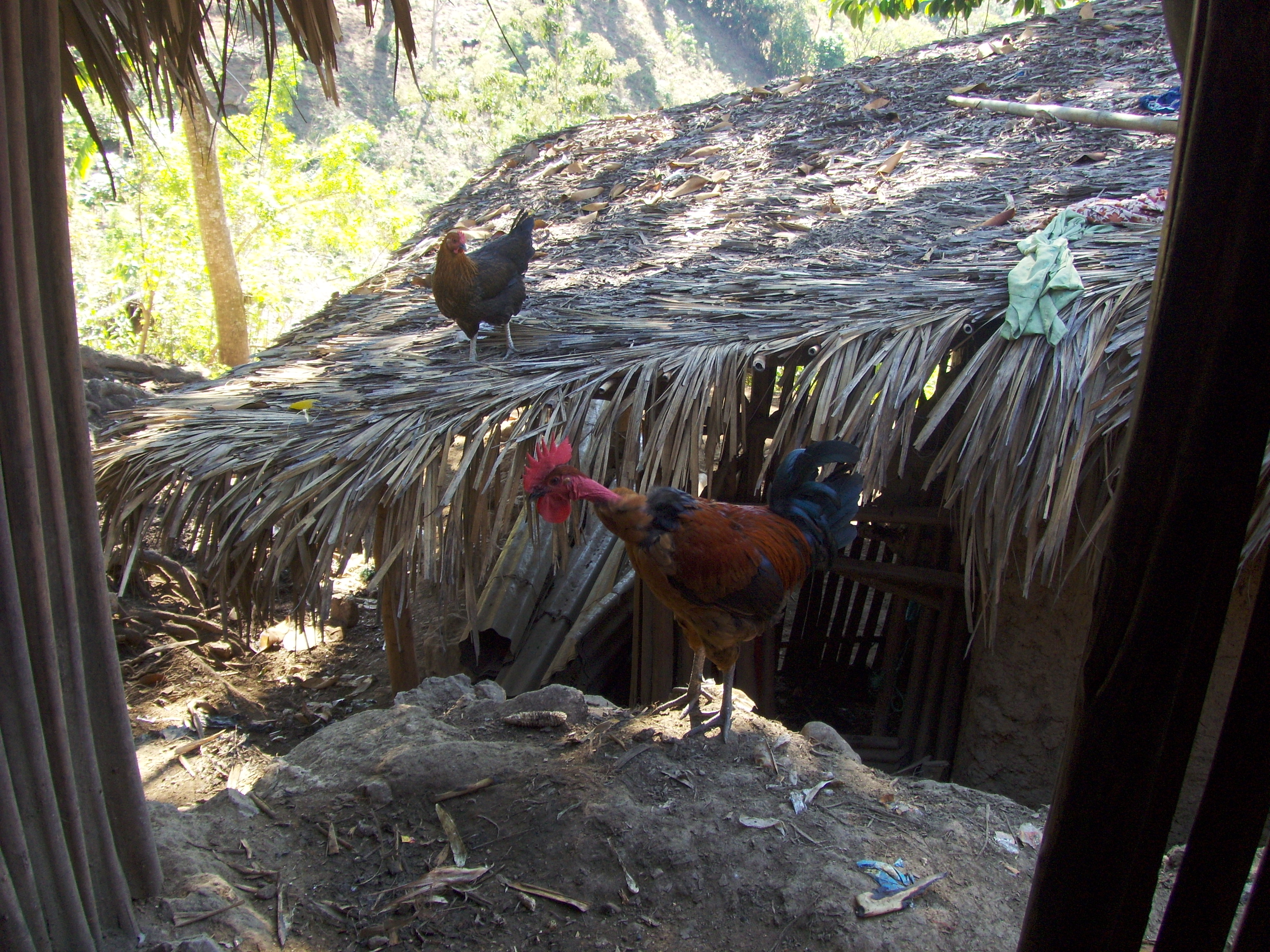 Patio de una viviendas típicas de Nearar, en el corredor seco del Municipio de Camotán, Departamento de Guatemala, Guatemala